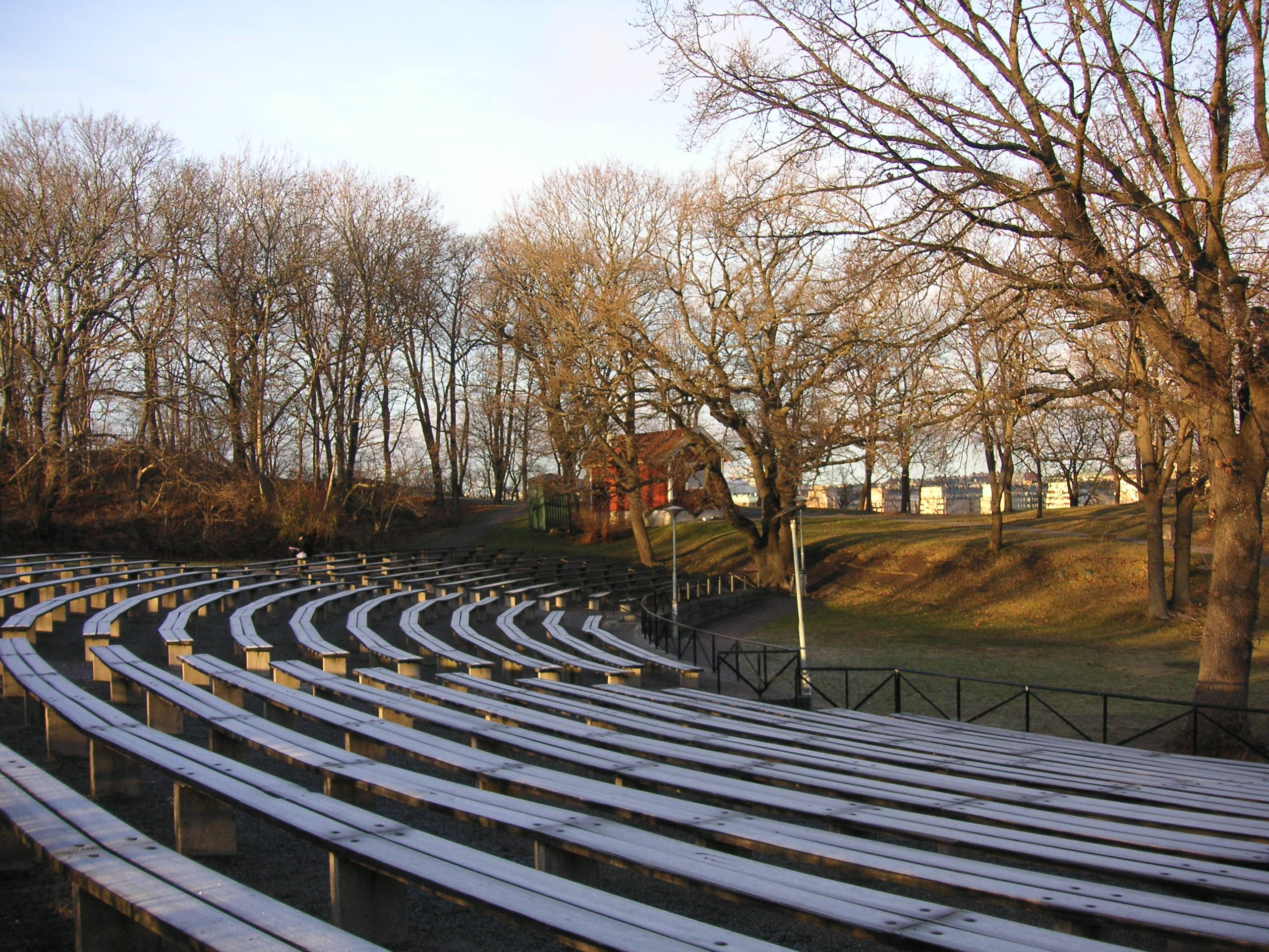 Långholmsparkens friluftsteater